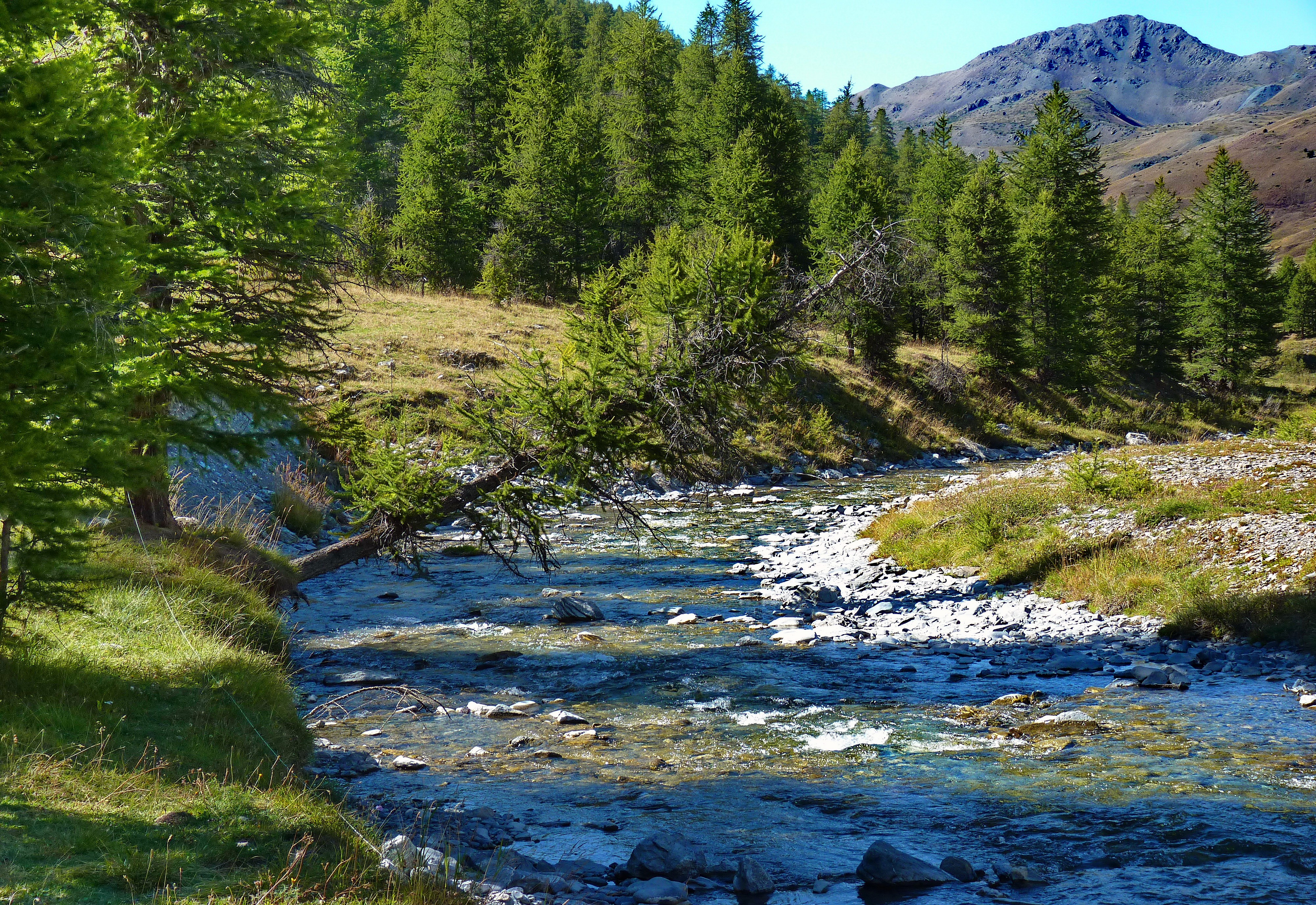 un arbre fatigué - Cervières, Francia